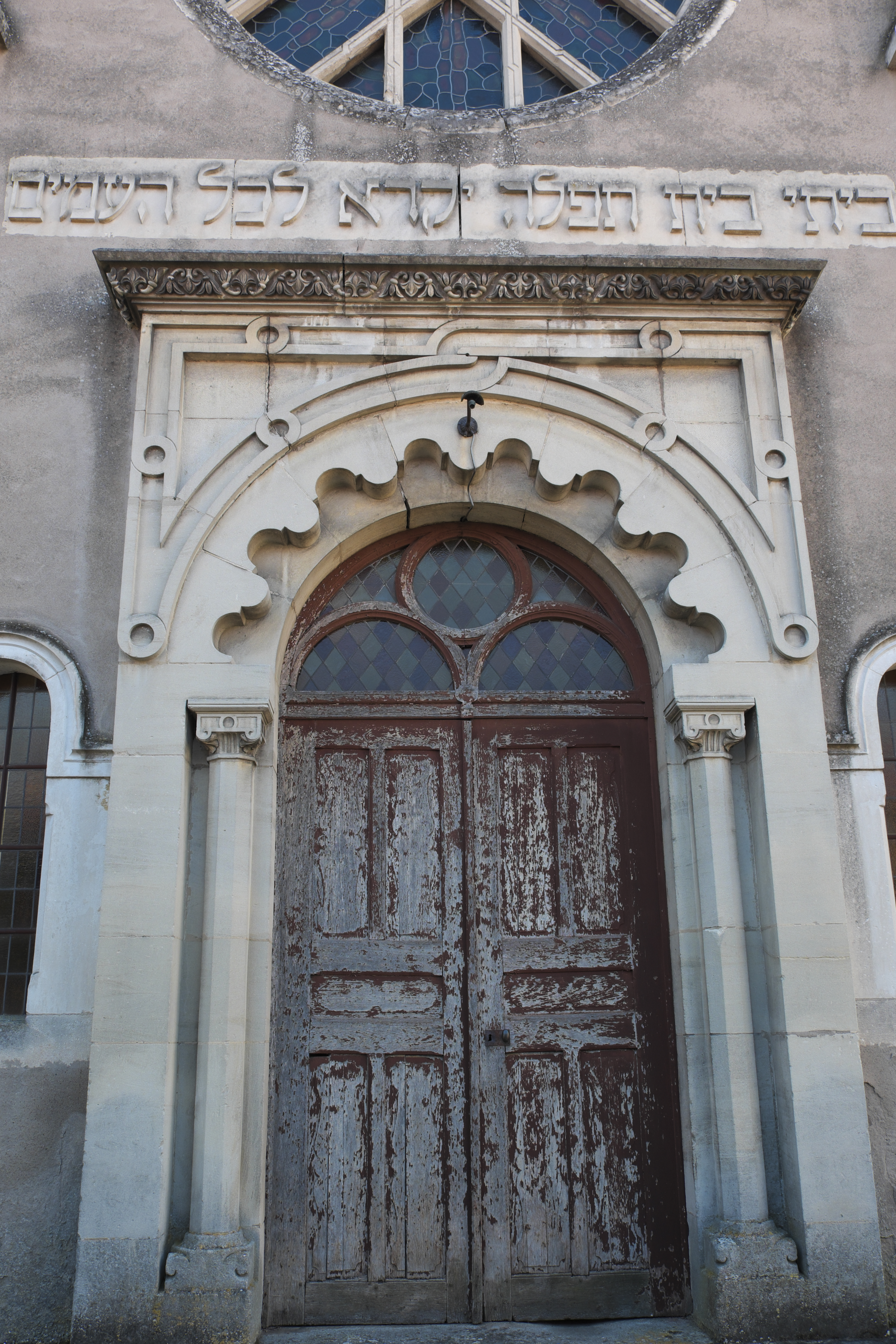 Synagoge in Toul im Département Meurthe-et-Moselle (Lothringen/Frankreich), Eingang